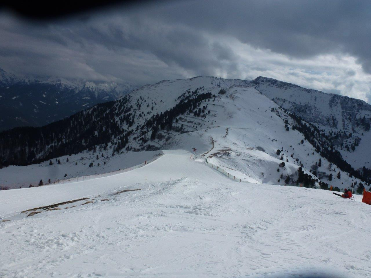 Italie Predazo pohoří Val di fieme